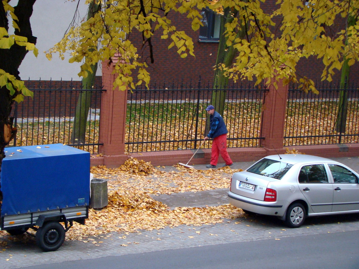 Sprzątanie opadłych liści (Ostrów Wlkp.)